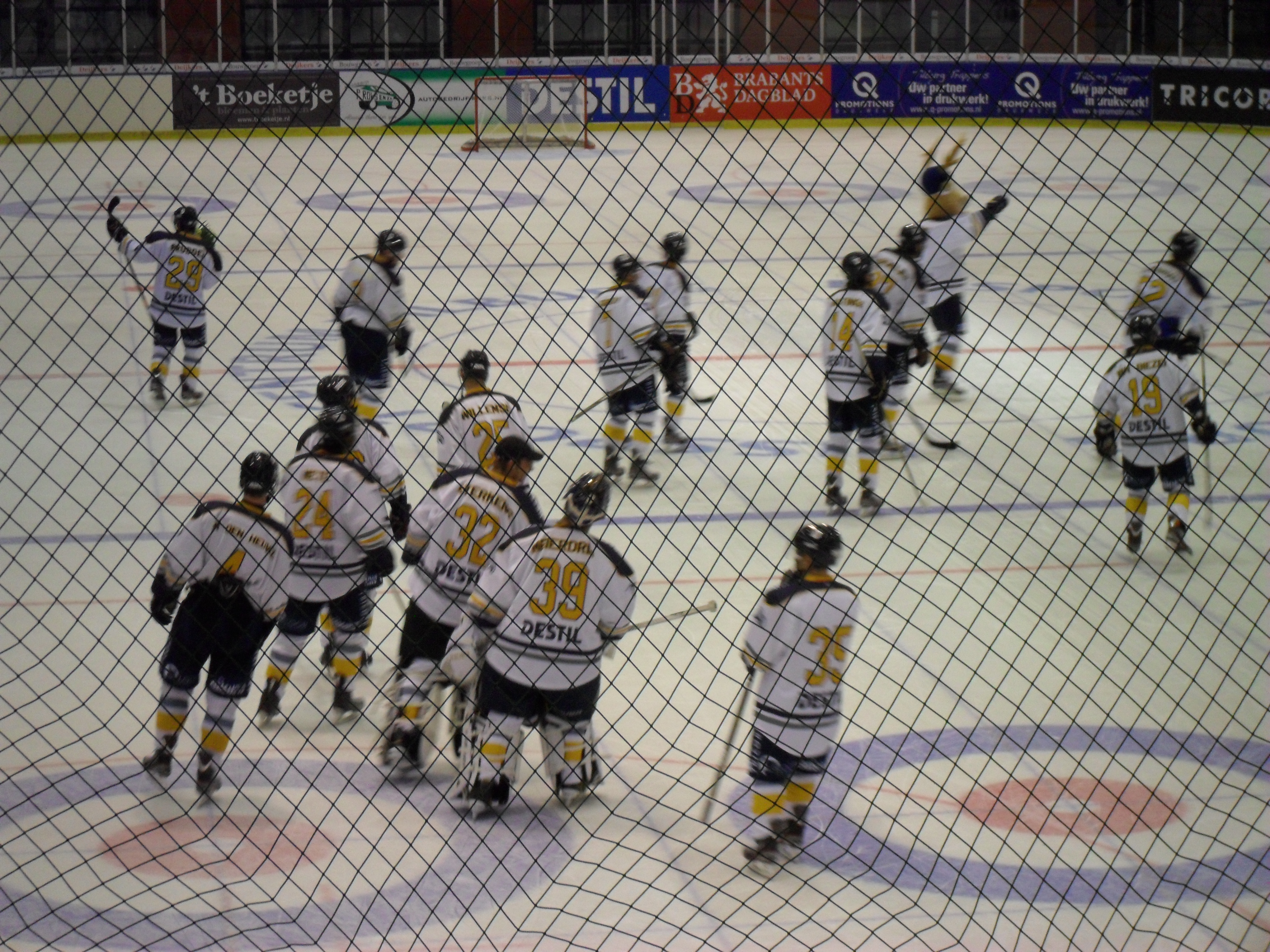 Spelers van de Tilburg Trappers na een wedstrijd